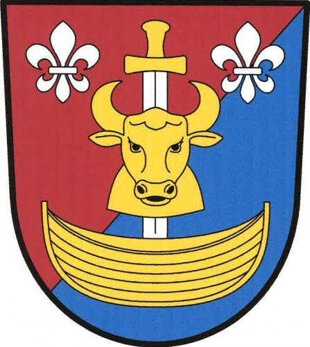 znak, Plaveč, okres Znojmo